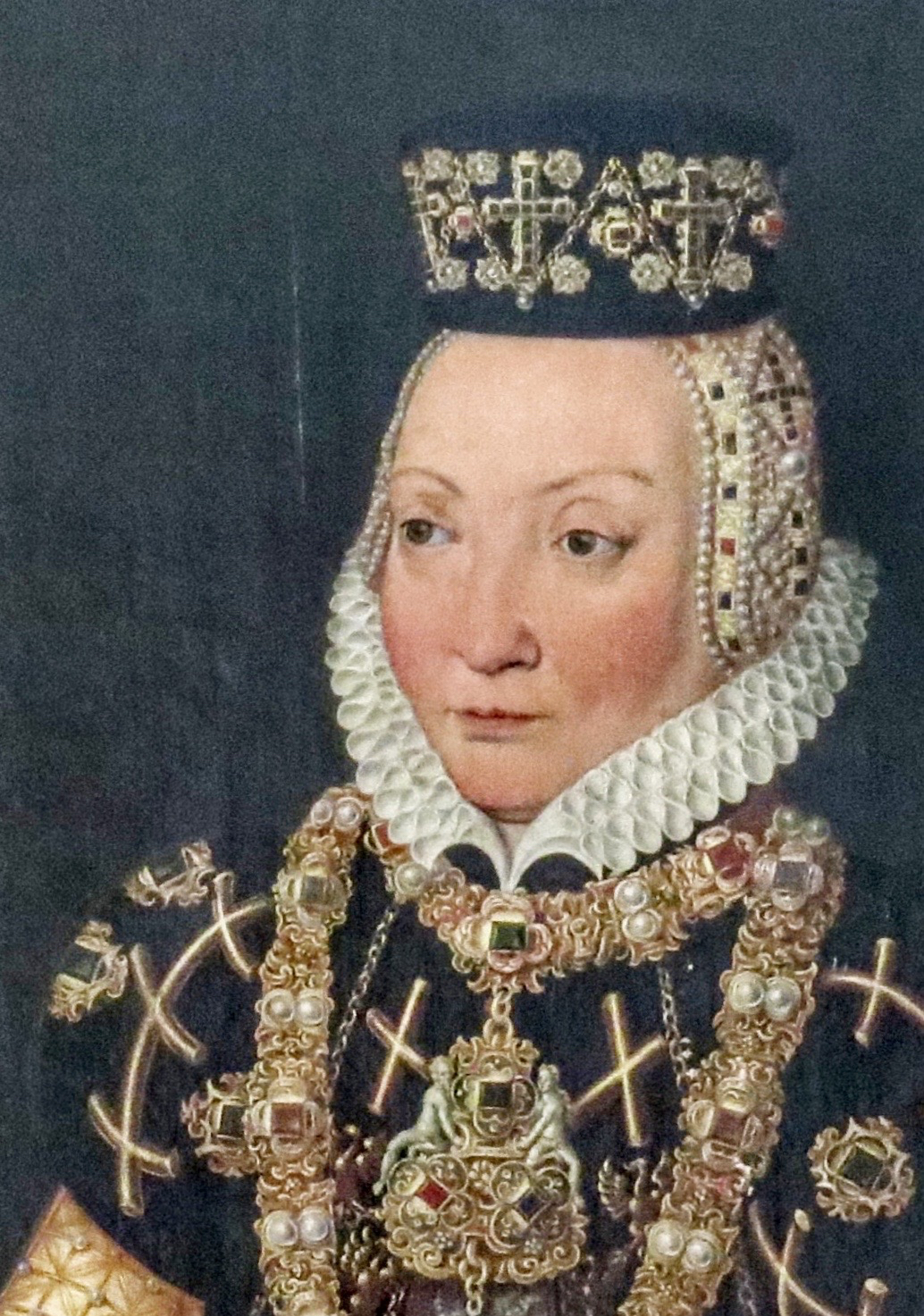 Anna Sophie af Preussen (1527-1591), detalje fra dobbeltportræt med ægtemanden Johann Albrecht I af Meklenborg, olje på træ af Peter Boeckel (-1599). Güstrow Slot.